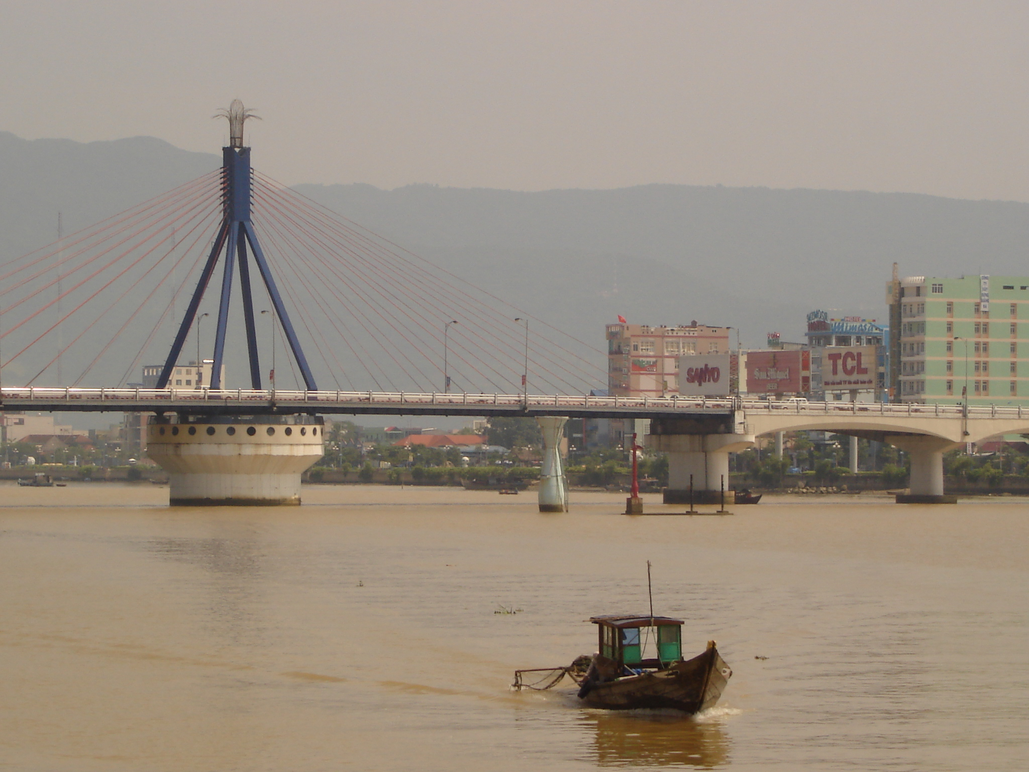 Sông Hàn Bridge over tje Hàn river.de